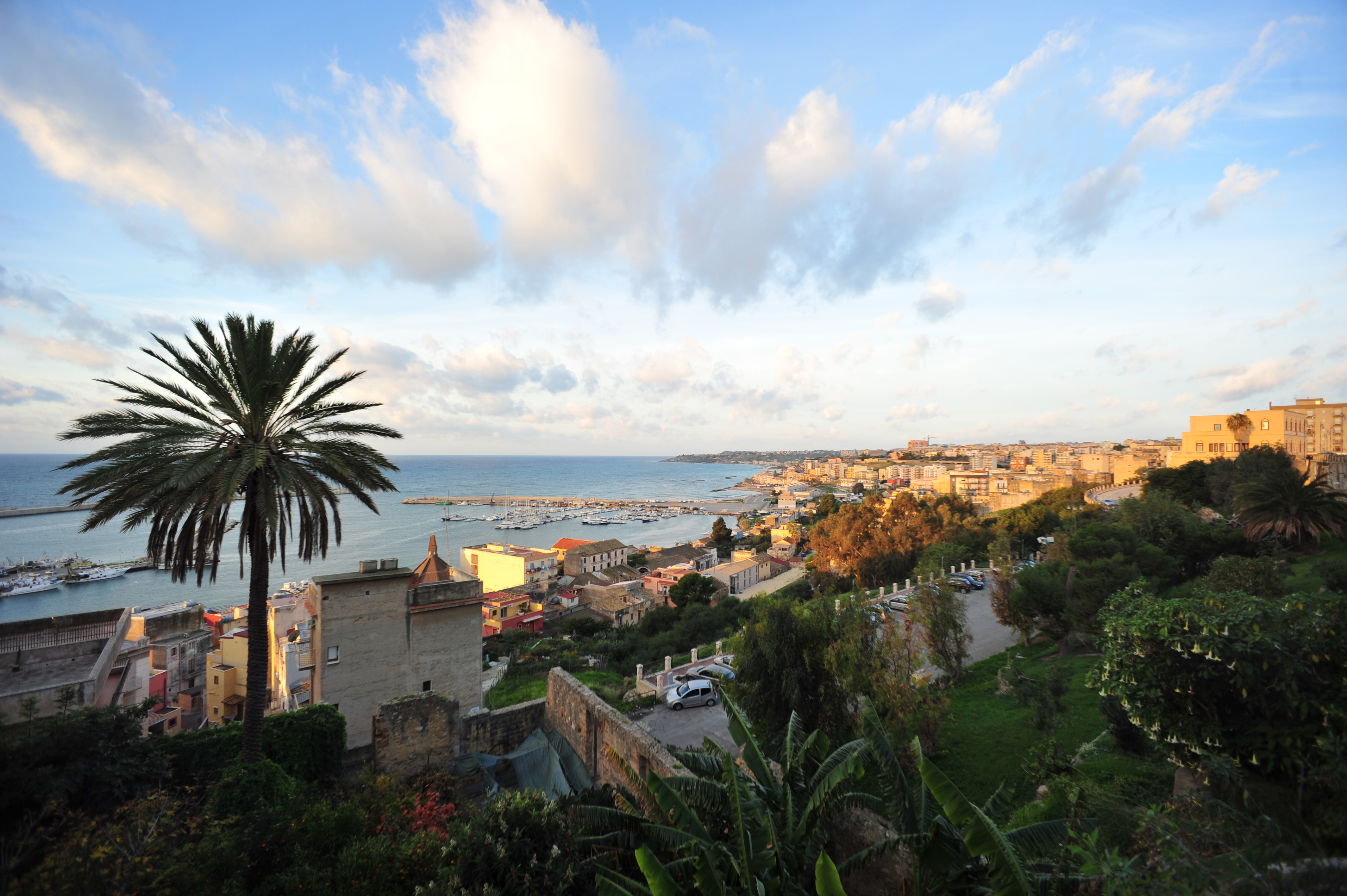 SCIACCA (Sicily) View from Piazza Scandaliato